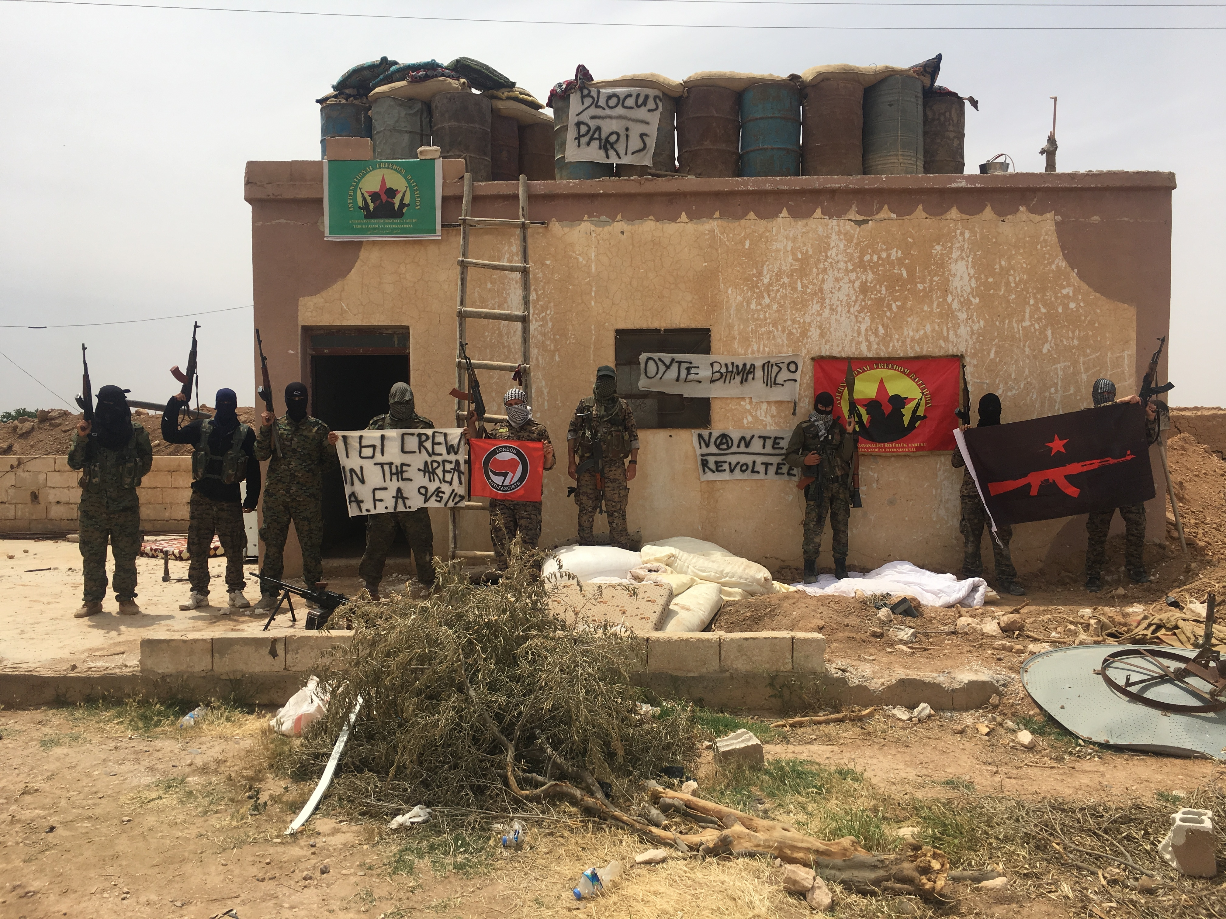 Combatientes de la Brigada Internacional de Liberación